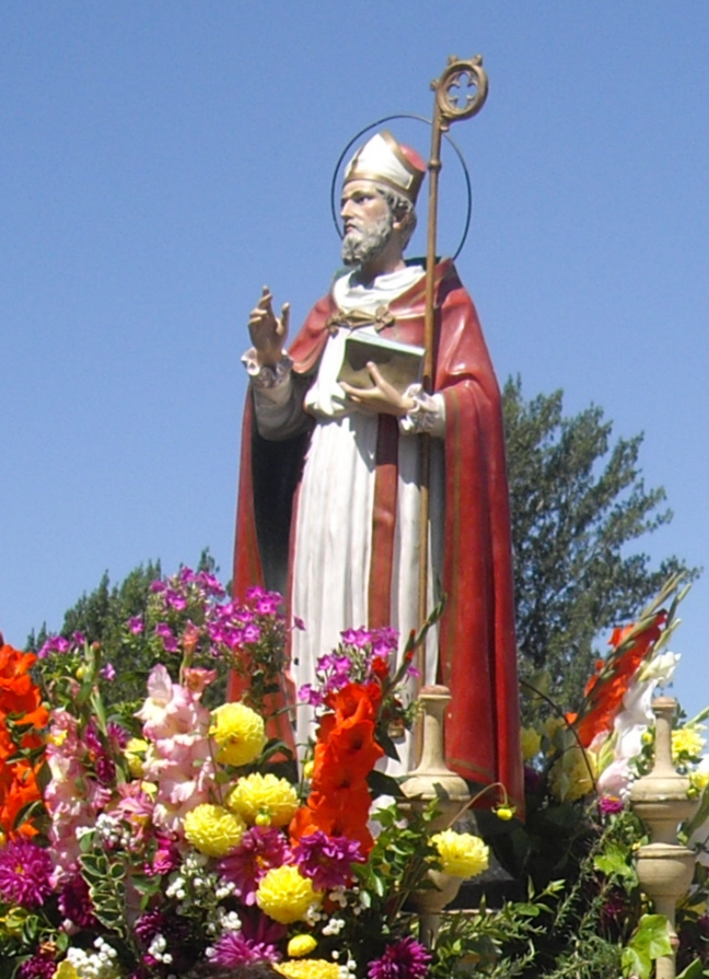 Patrón de Navafría de la Sobarriba, León